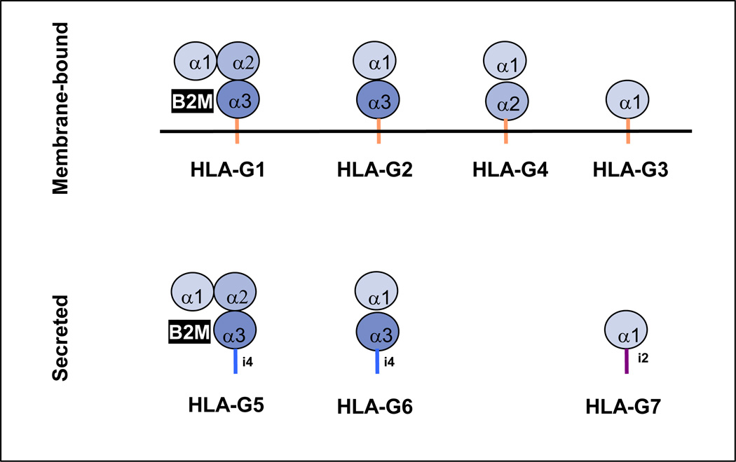 O splicing alternativo gera diferentes isoformas de proteínas devido combinação diversa do exóns disponíveis para montagem do peptídeo.